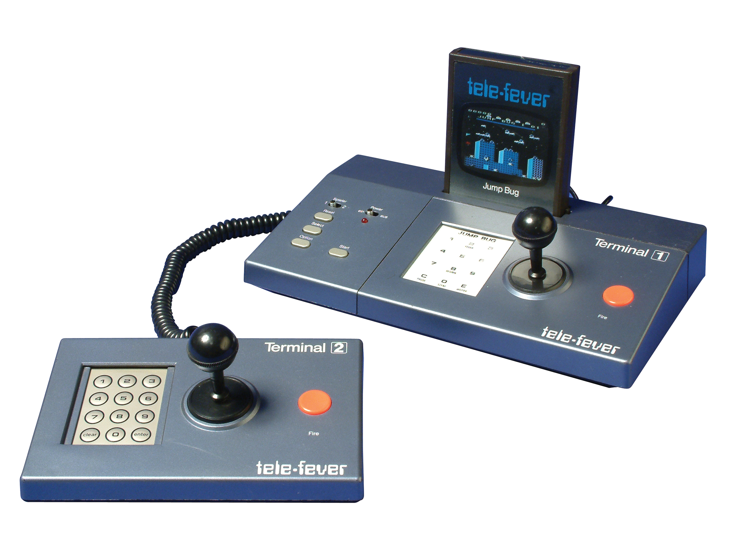 computerspielemuseum-38